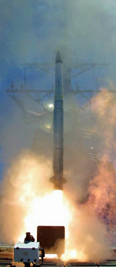 RIM-162 ESSM launch